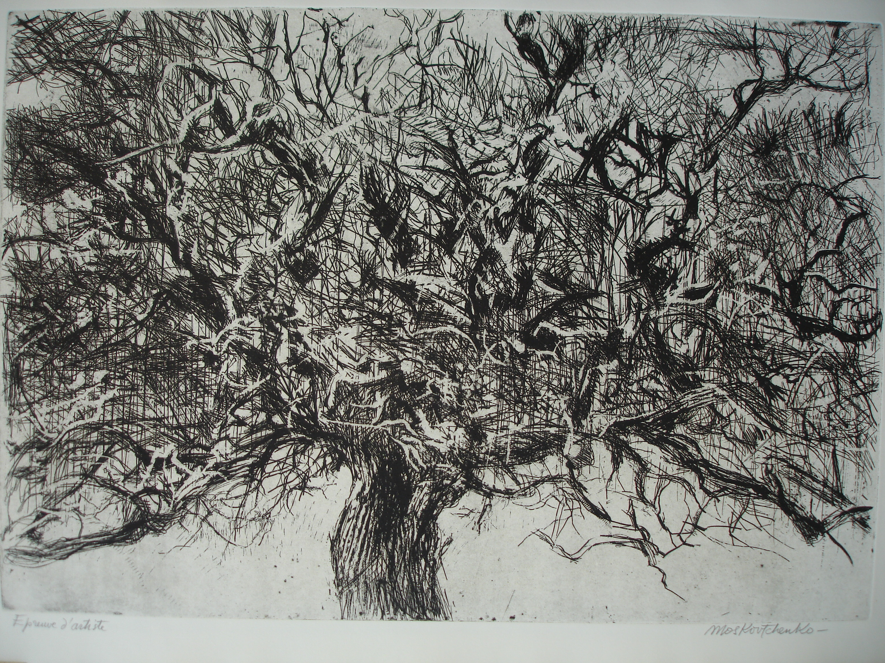 Grand chëne à murs, eau-forte (gravure au trait à la lame de rasoir et grain à la bombe) 63 × 90 cm, 1997